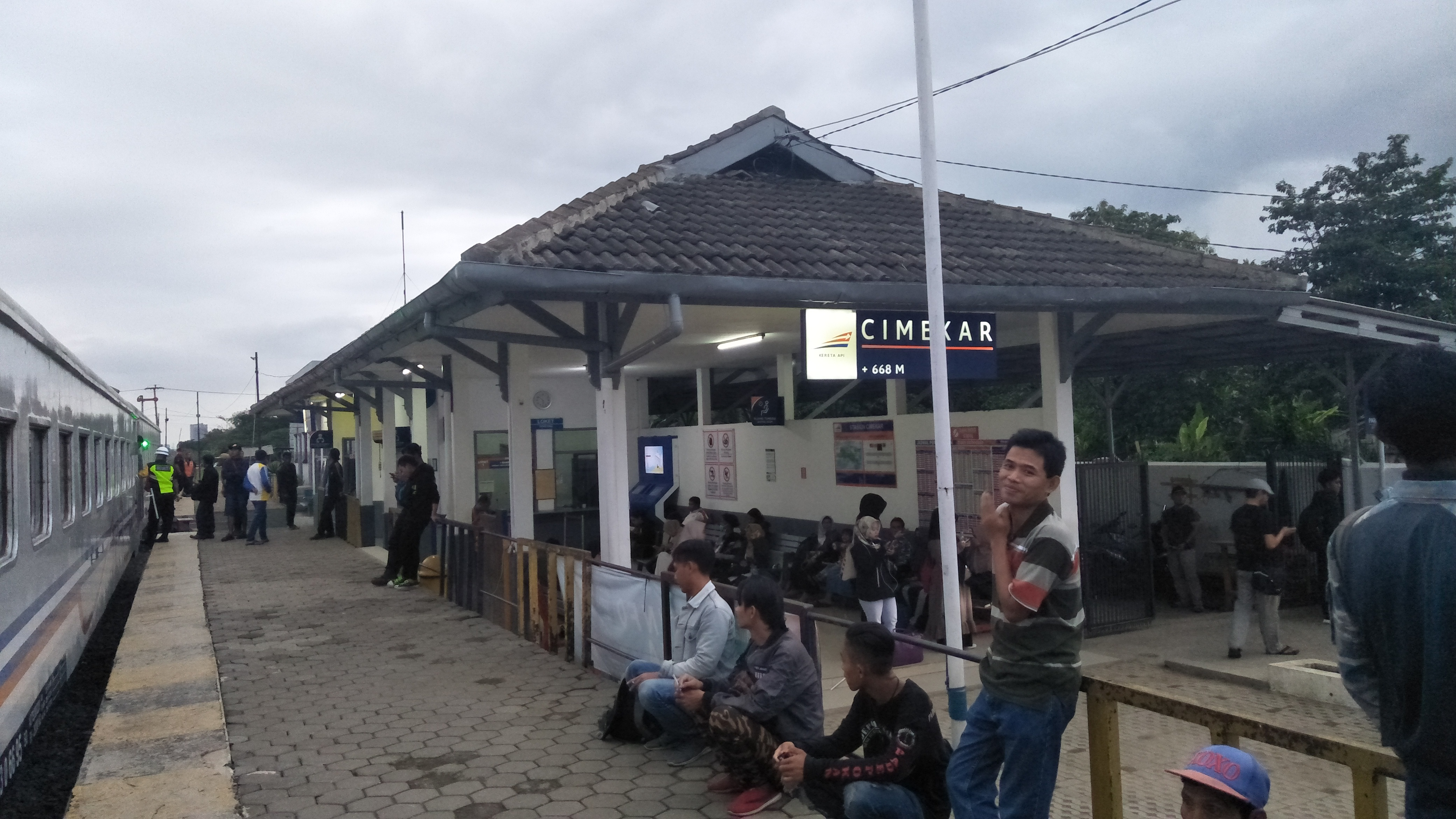 Emplasemen stasiun Cimekar